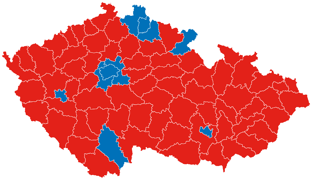 Výsledky druhého kola volby prezidenta České republiky v roce 2013 podle okresů (červeně Miloš Zeman, modře Karel Schwarzenberg)